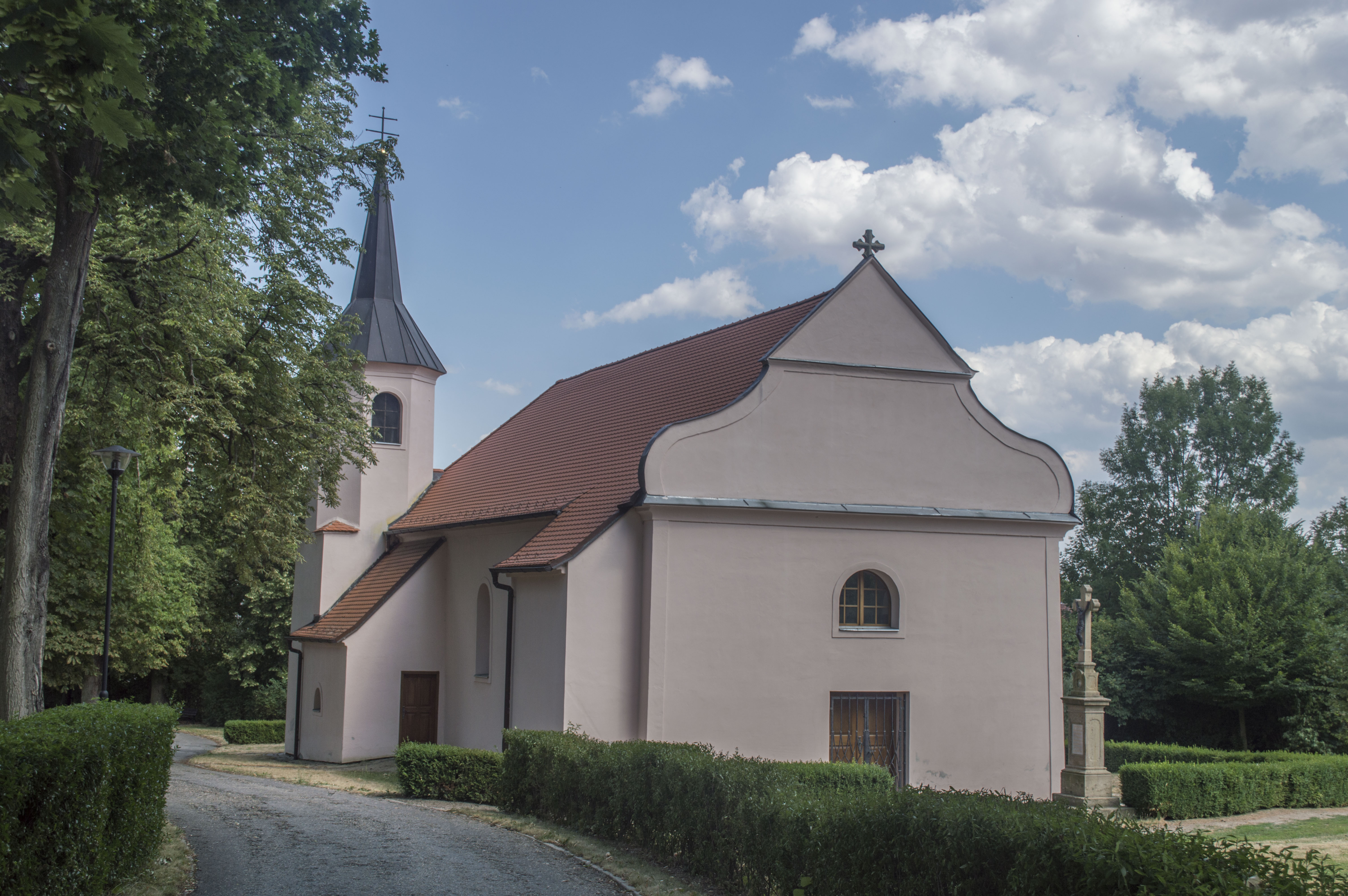 Kostel sv. Mikuláše v Miroslavských Knínicích pocházející z 13. století, stojící v místním parku blízko zámku.